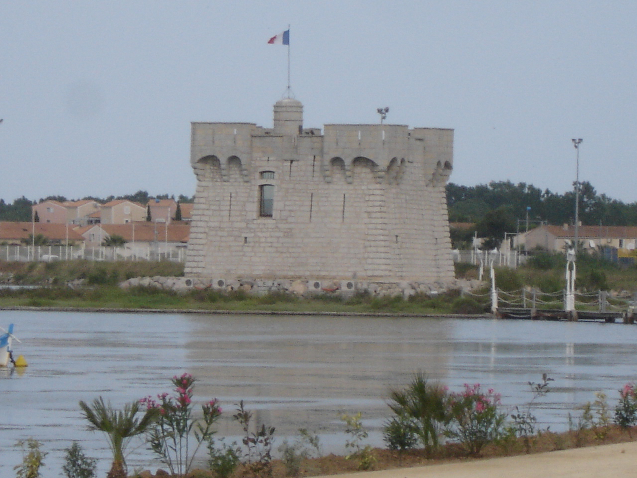 Palavas-les-Flots (Hérault) : vue de la REDOUTE depuis la route de Carnon